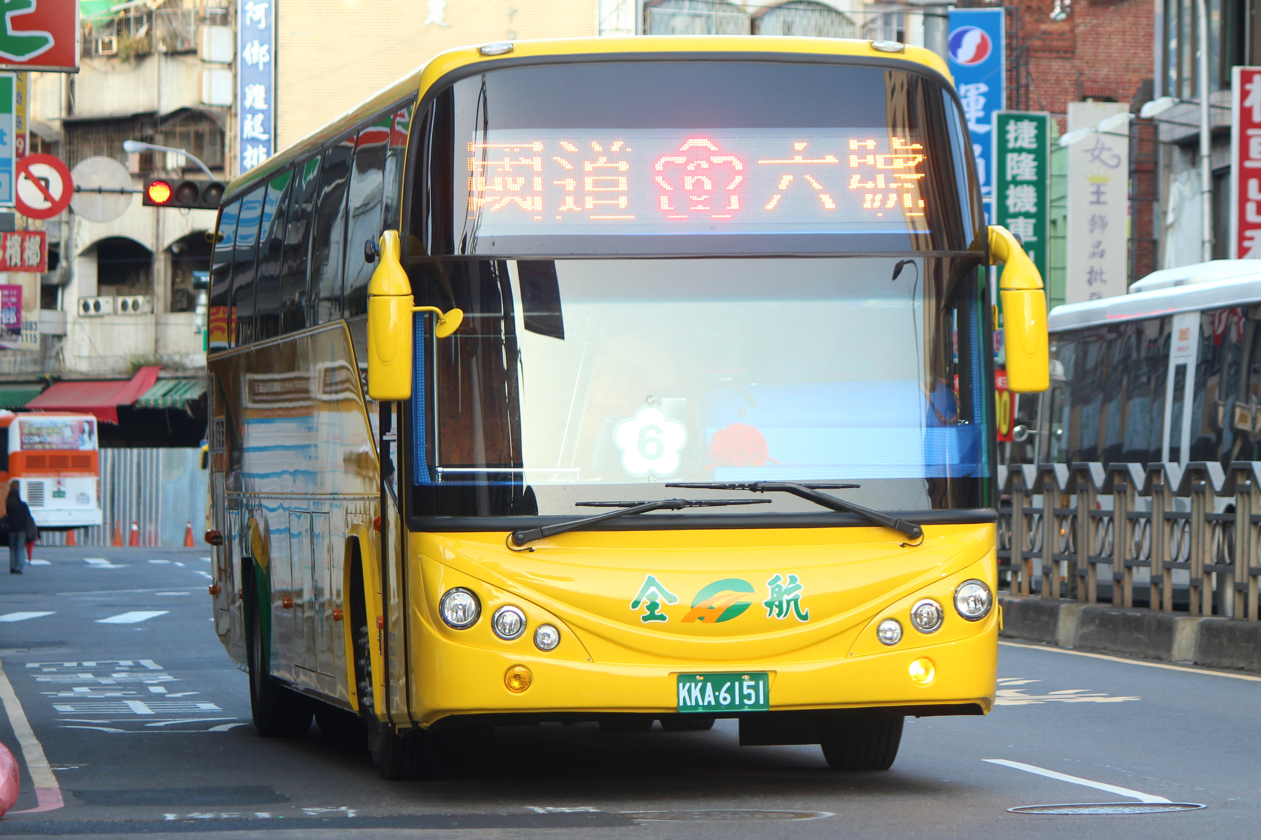 6268 台中火車站